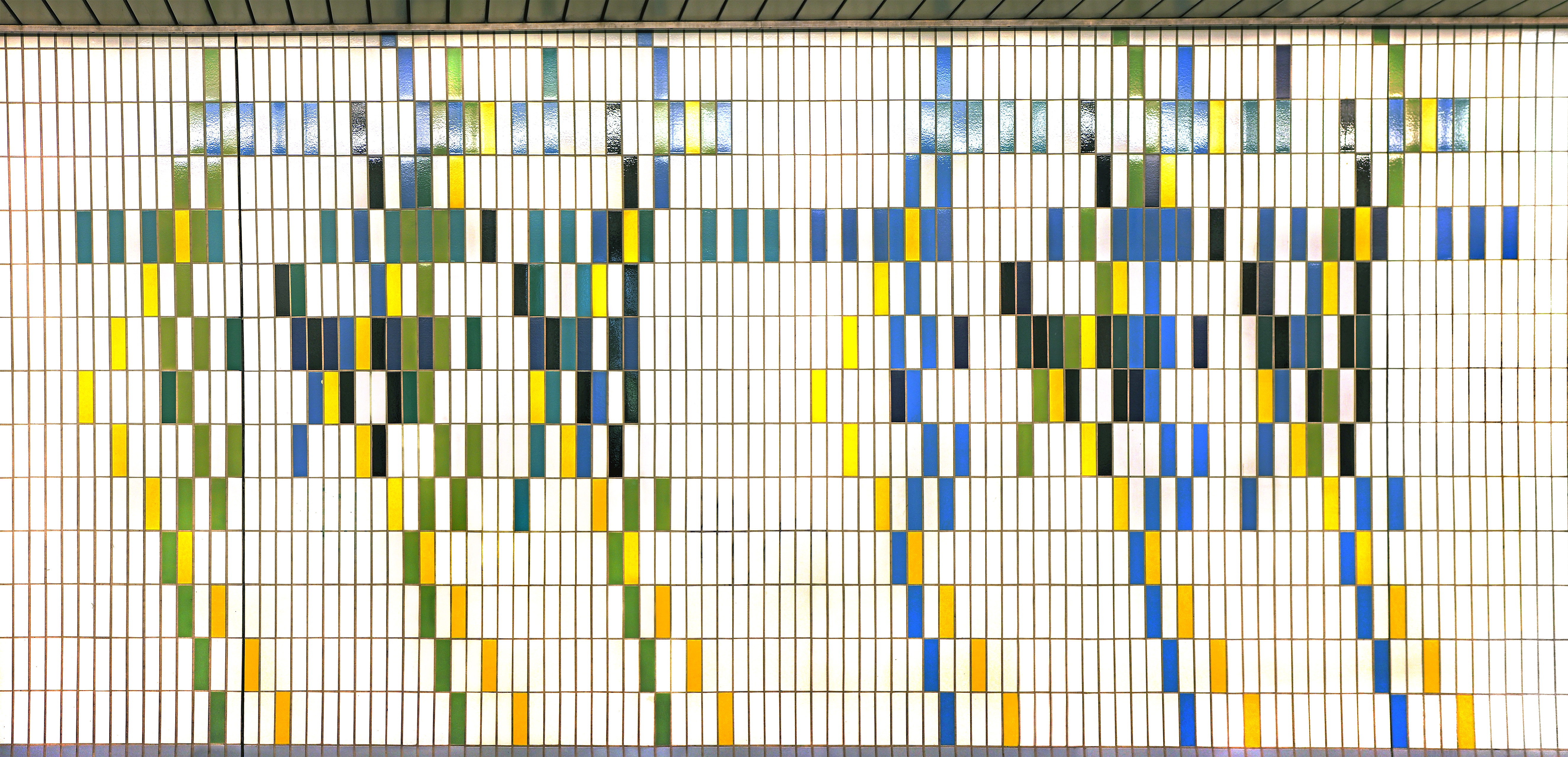 Klangpartitur an der Wand des U-Bahnhofs Spichernstraße in Berlin